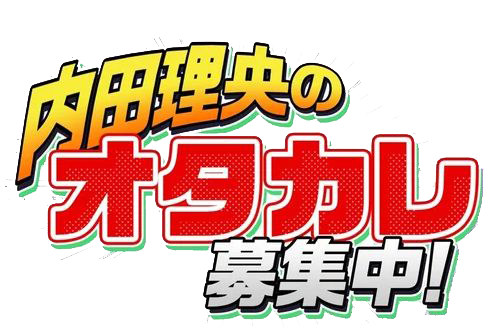 内田理央のオタカレ募集中!